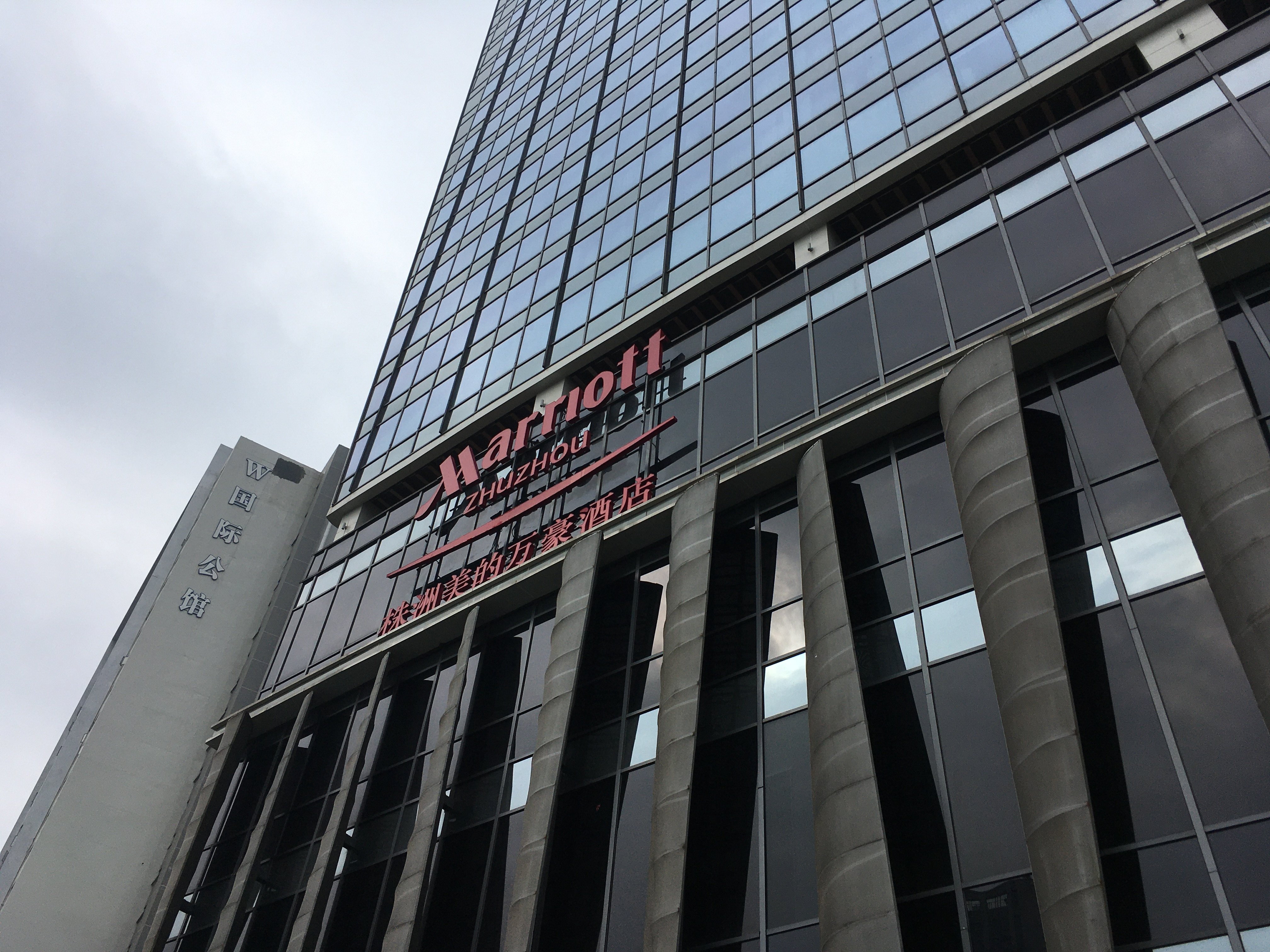 株洲美的萬豪酒店。